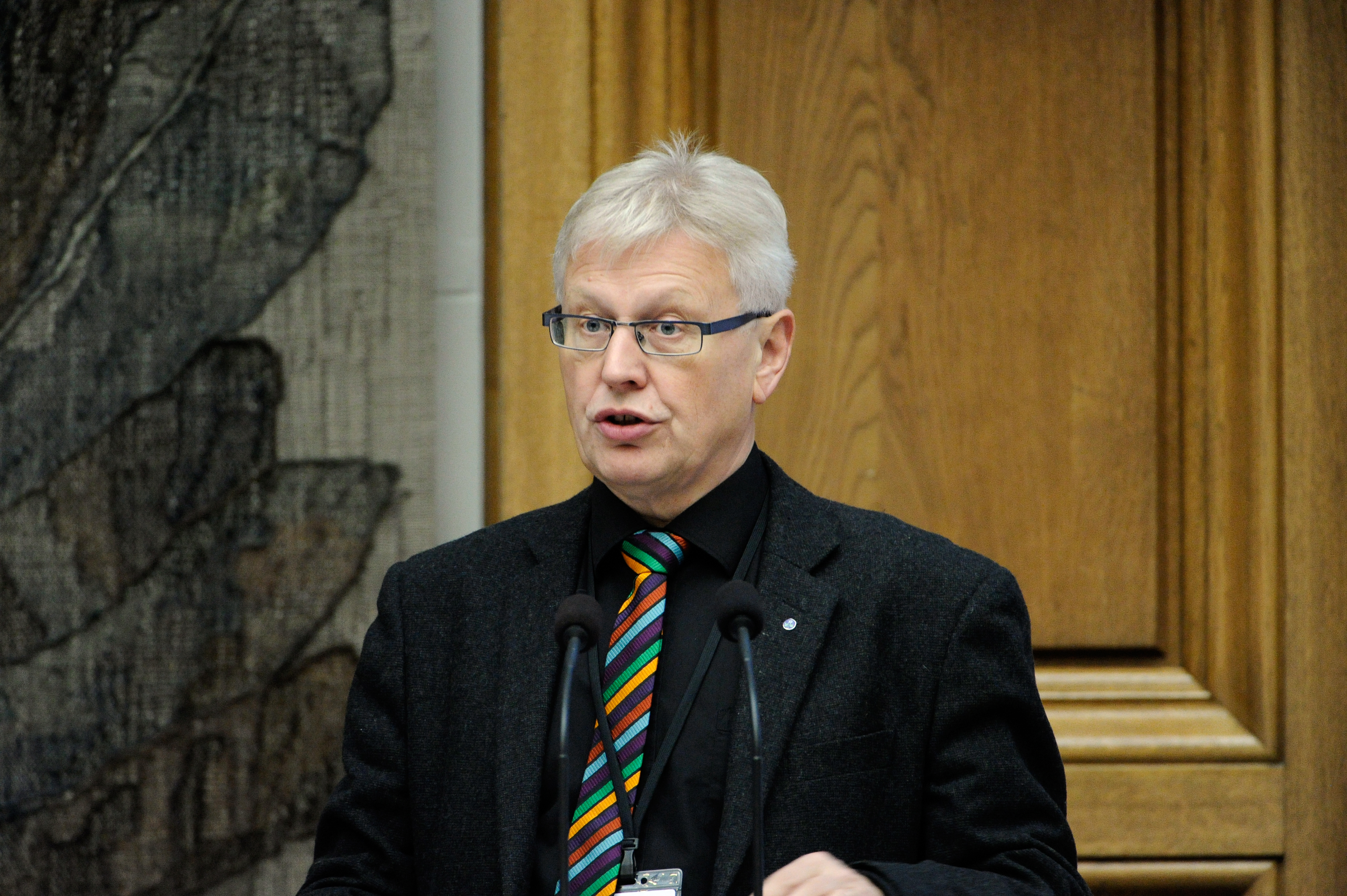 Anders Andersson (KD) Sverige, Nordiska rådets session 2011 i Köpenhamn